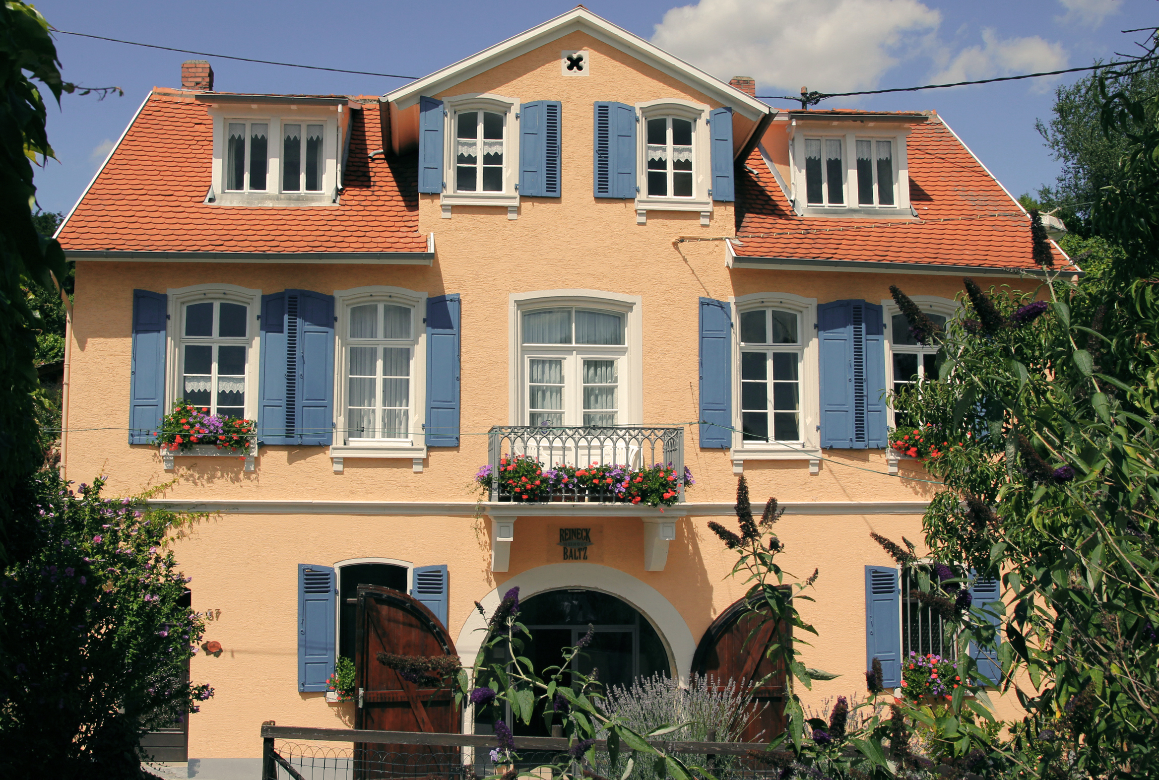 Heute befindet sich in diesem historischen Gebäude die Vinothek des Weingut Reineck-Baltz. Das Haus ist in den Berg gebaut, im Erdgeschossen ragen zwei Stollen weit ins Erdreich. Sie wurden ursprünglich, als Teil des alten Kelterhauses zur Weinlagerung verwendet und sind heute für jederman zugänglich.